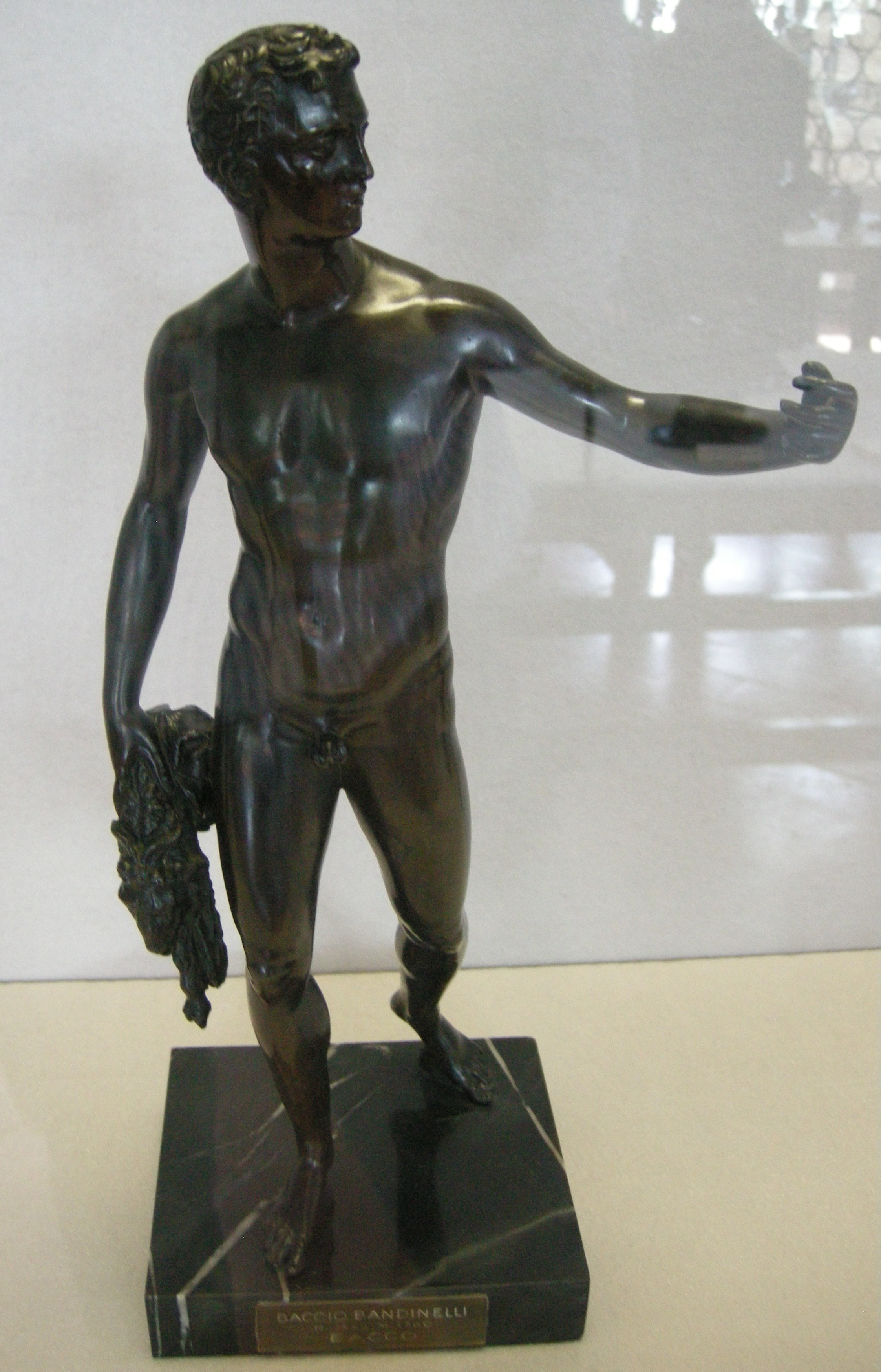 Baccio bandinelli, giasone